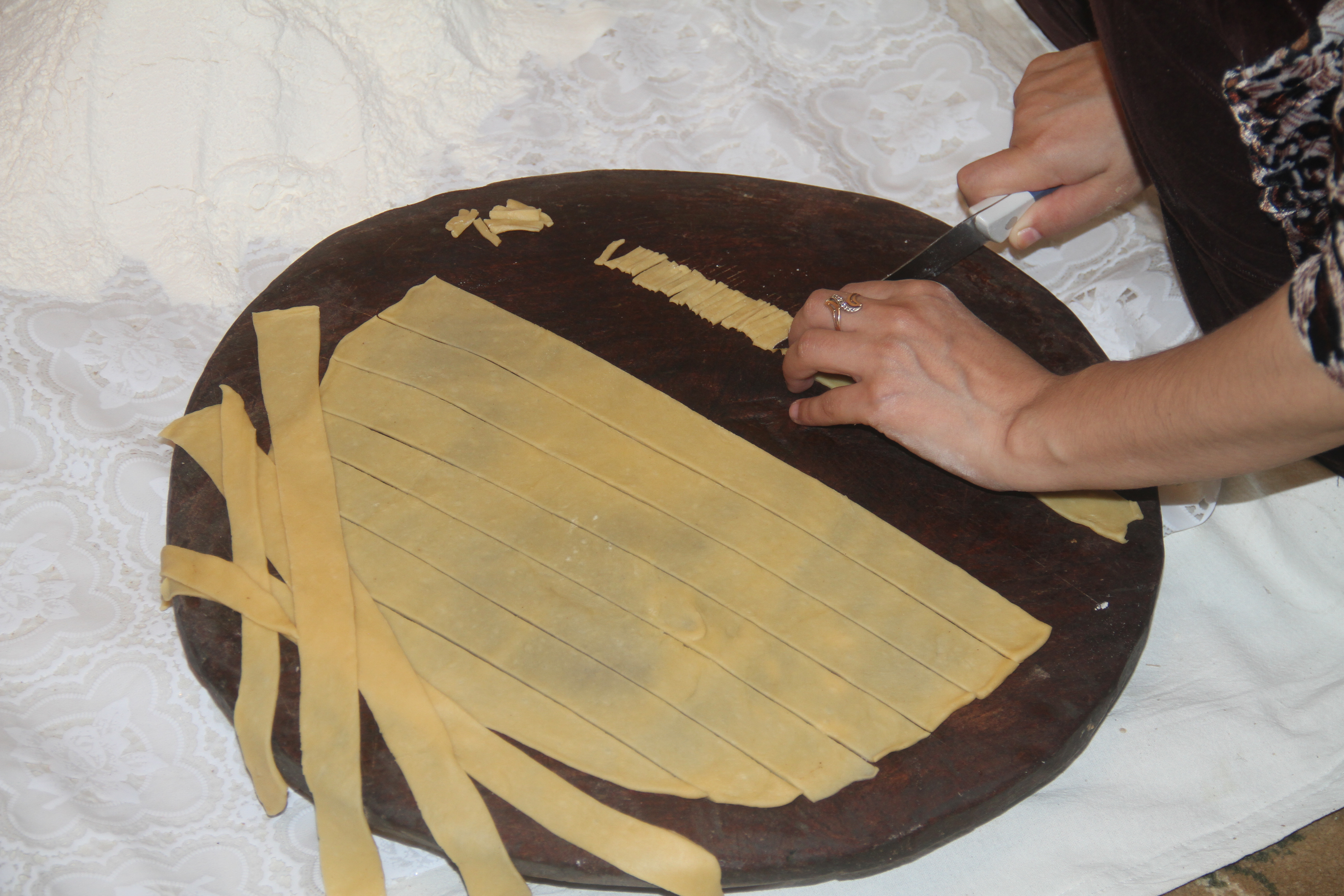 Тоҷикӣ: Чак-чак (6)